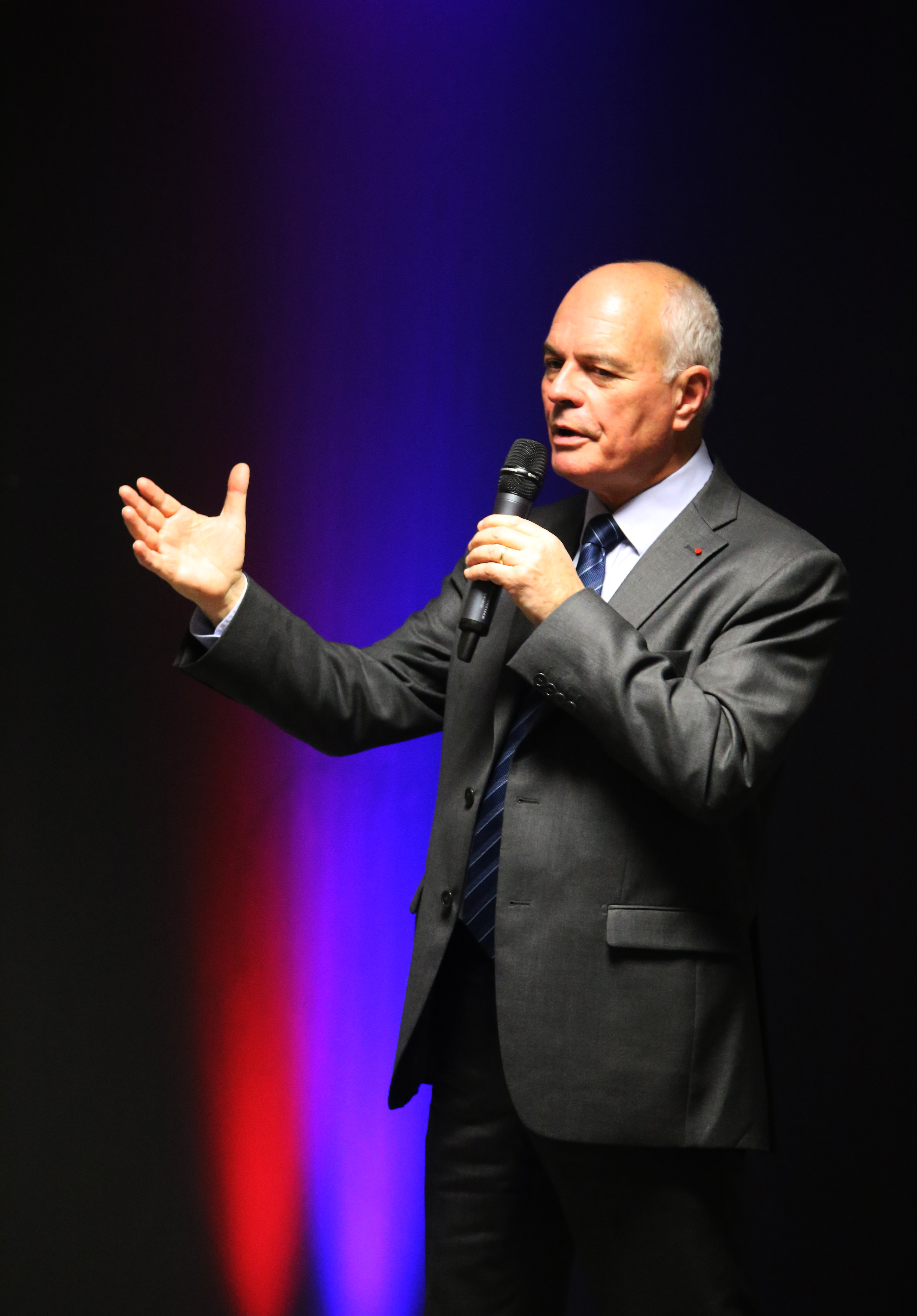 Didier Tauzin en meeting à Rennes le 21 Novembre. Il a présenté son projet pour rebâtir la France.